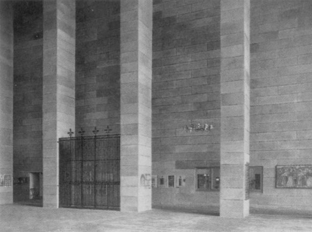 Eingang einer Messehalle in Leipzig, Architekt: Curt Schiemichen. 15.7 x 21.9 cm, Gelatine-Silber-Abzug